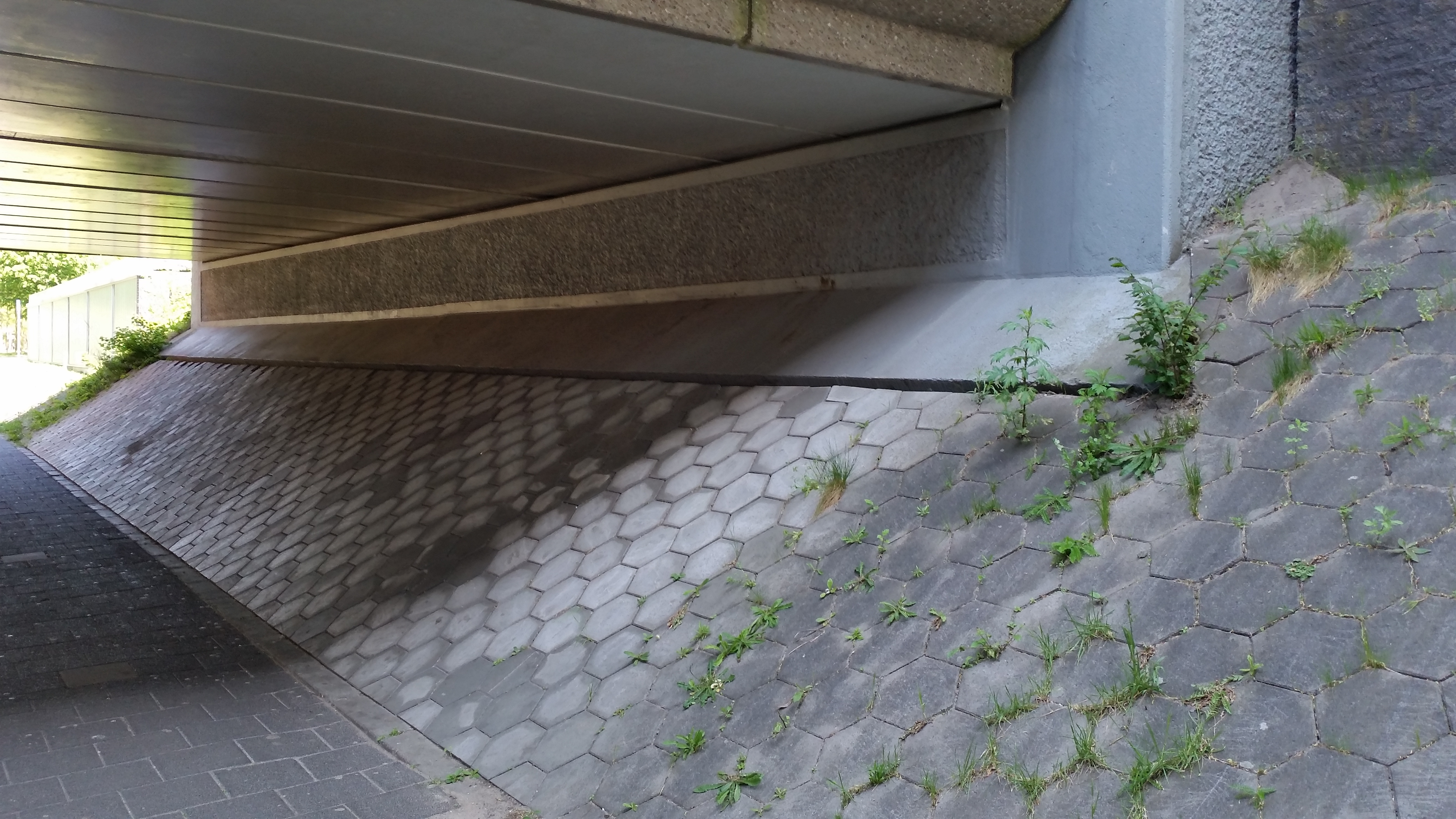 Impressie van brug 1260; Burgemeester Stramanbrug, Amsterdam-Zuidoost